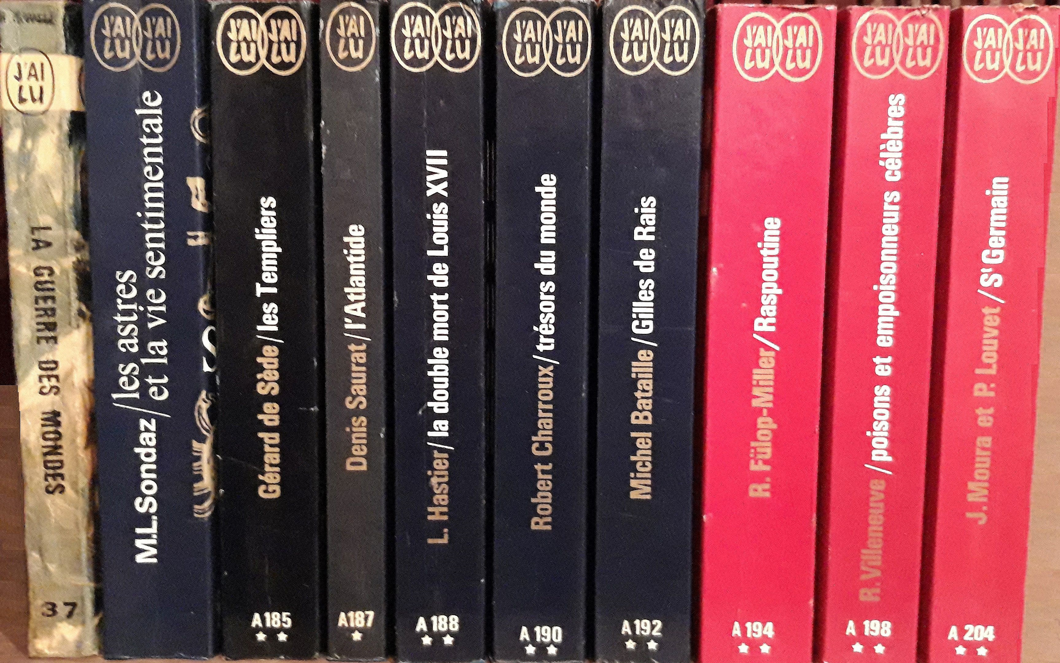 Neuf premières 'Aventure Mystérieuse'.